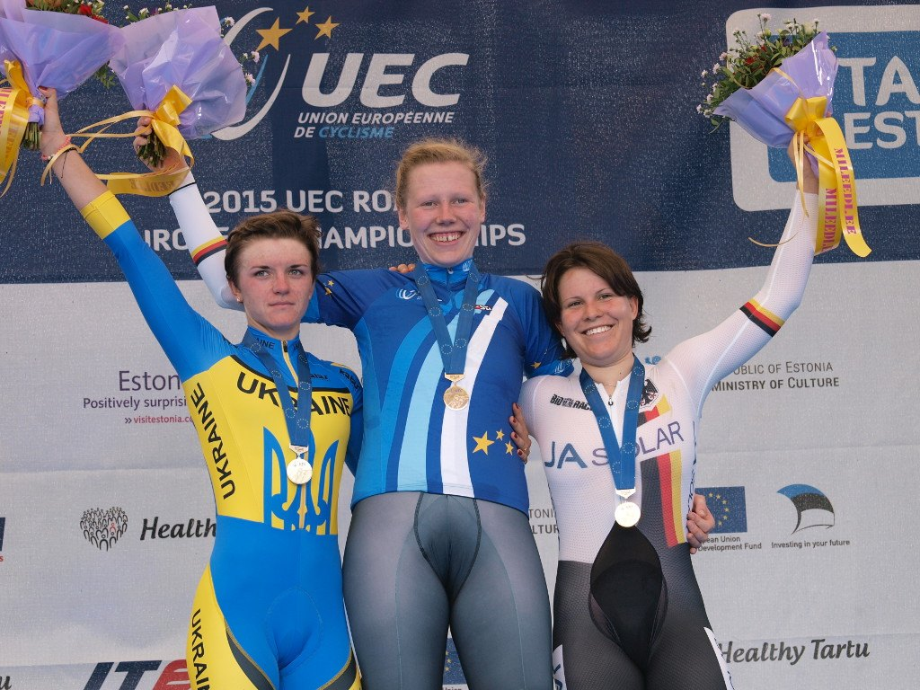 Podest Einzelzeitfahren bei den UEC-Straßen-Europameisterschaften der Junioren/U23 2015, v.l.n.r.: Olga Schekel, Mieke Kröger, Corinna Lechner